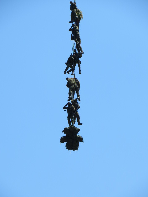 Schweizer Grenadiere mit Superpuma